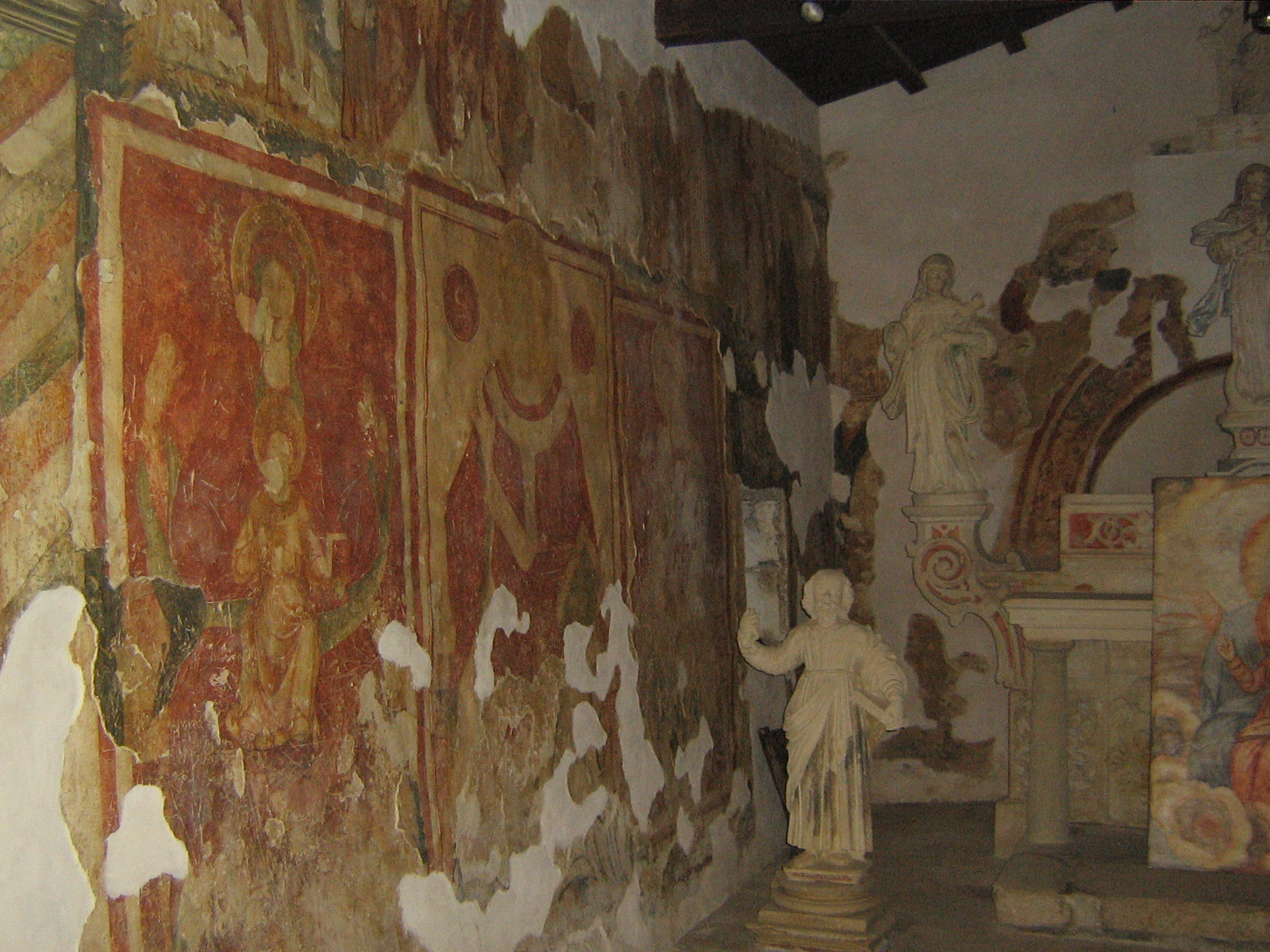 Nociglia, gli affreschi della chiesa bizantina di San Nicola, dal XX secolo inglobata nella chiesa della Madonna dell'Idri.